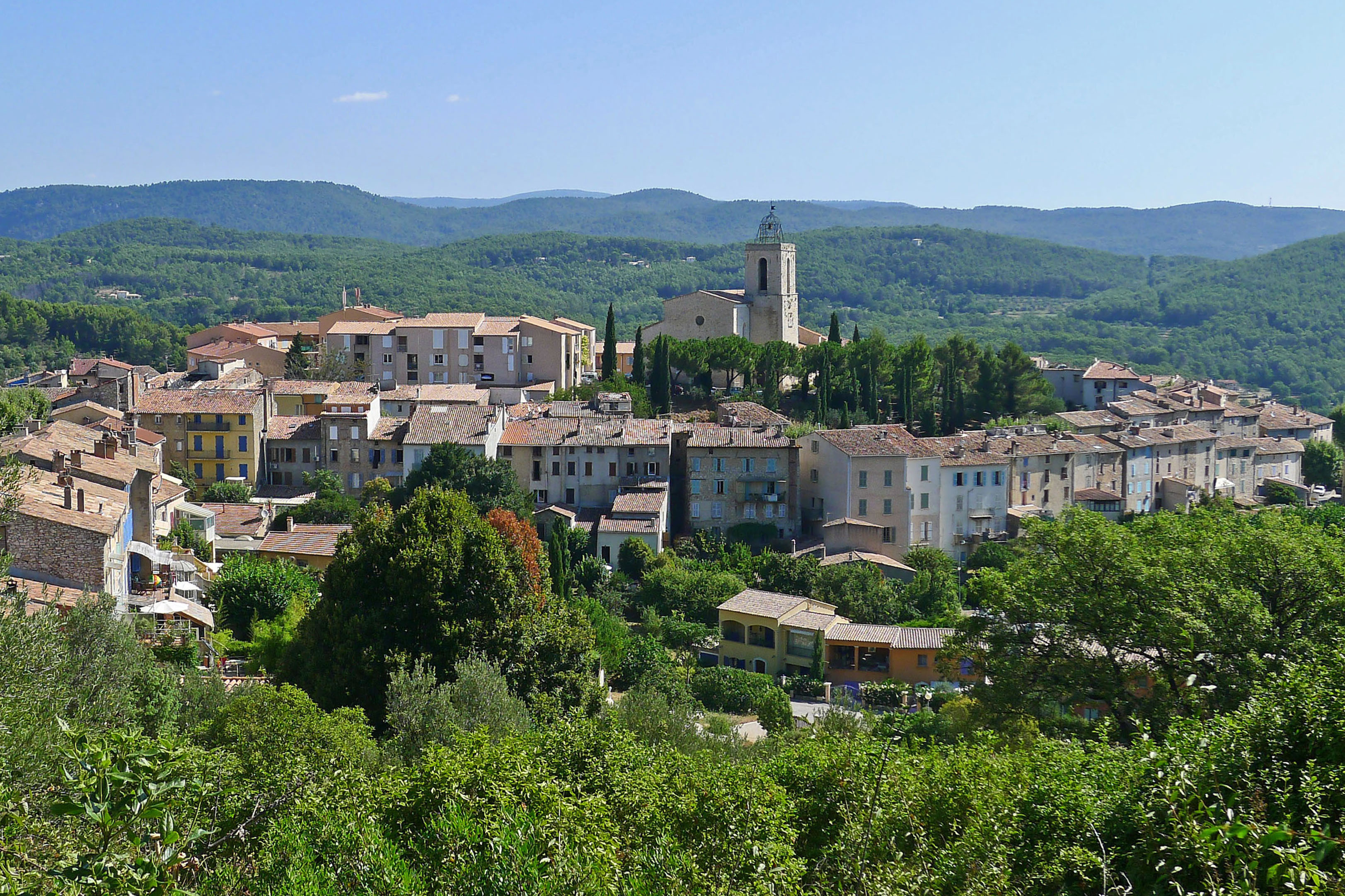 Vue du village de Flayosc depuis le chemin de la Colle